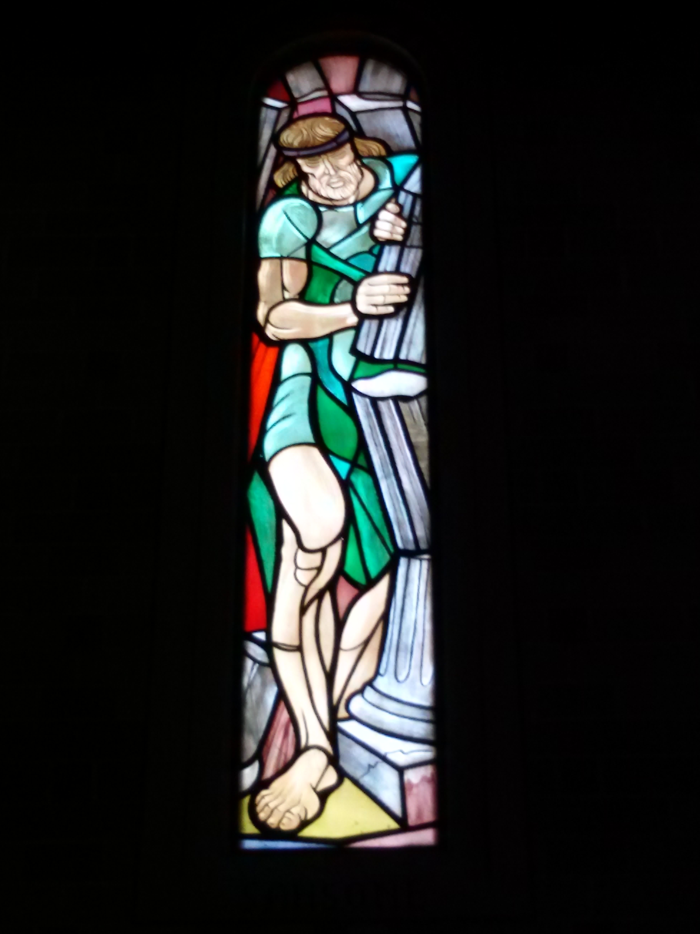 vetrata